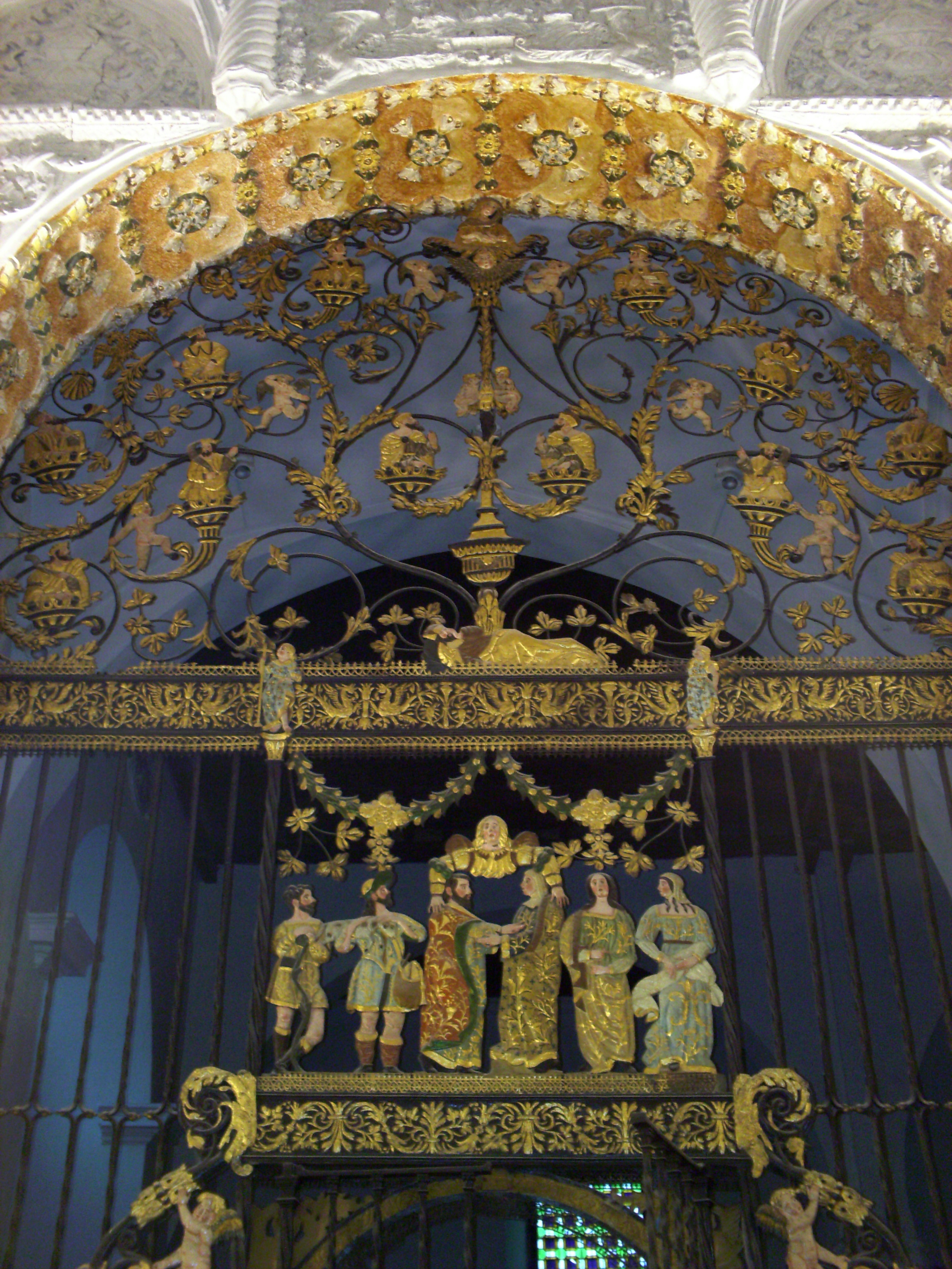 Reja del Abrazo ante la Puerta Dorada, del Maestro Bartolomé, en Jaén.